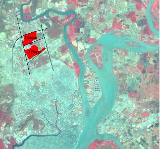 Localización de Bastión Popular, al norte de Guayaquil, Gráfica elaborada por el Programa ZUMAR